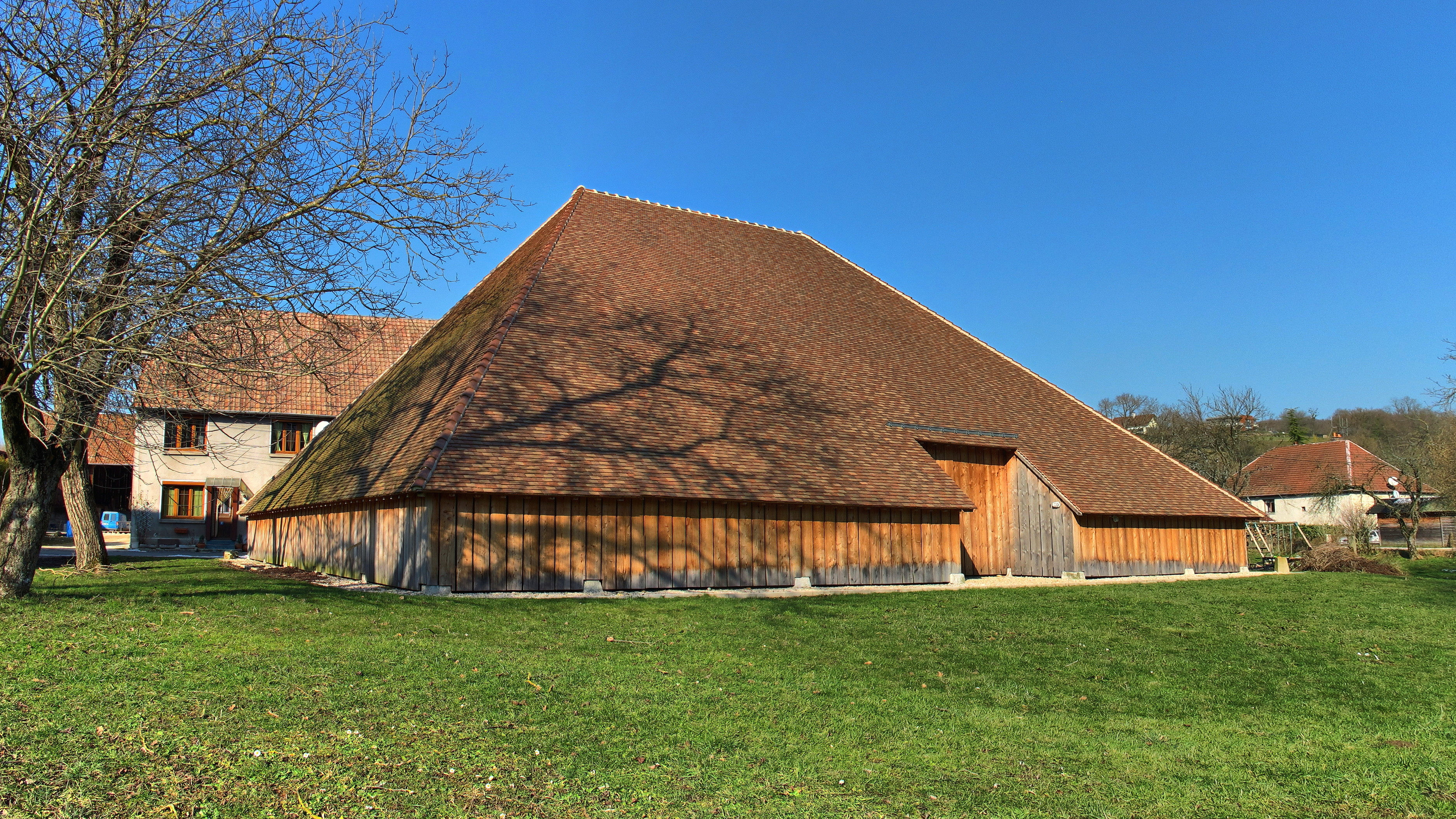 Inscrit aux monuments historiques sous le numéro : PA25000025